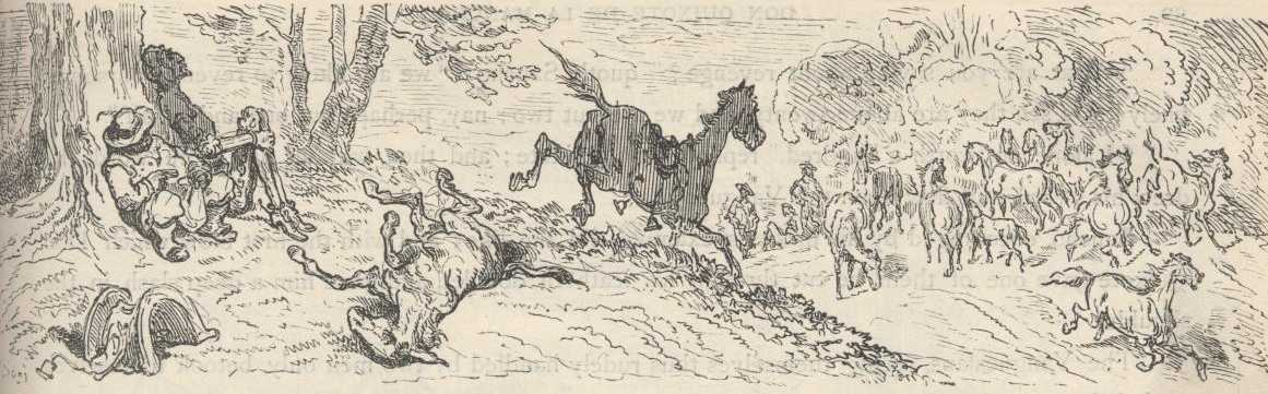 O Rocinante é atraído para as éguas